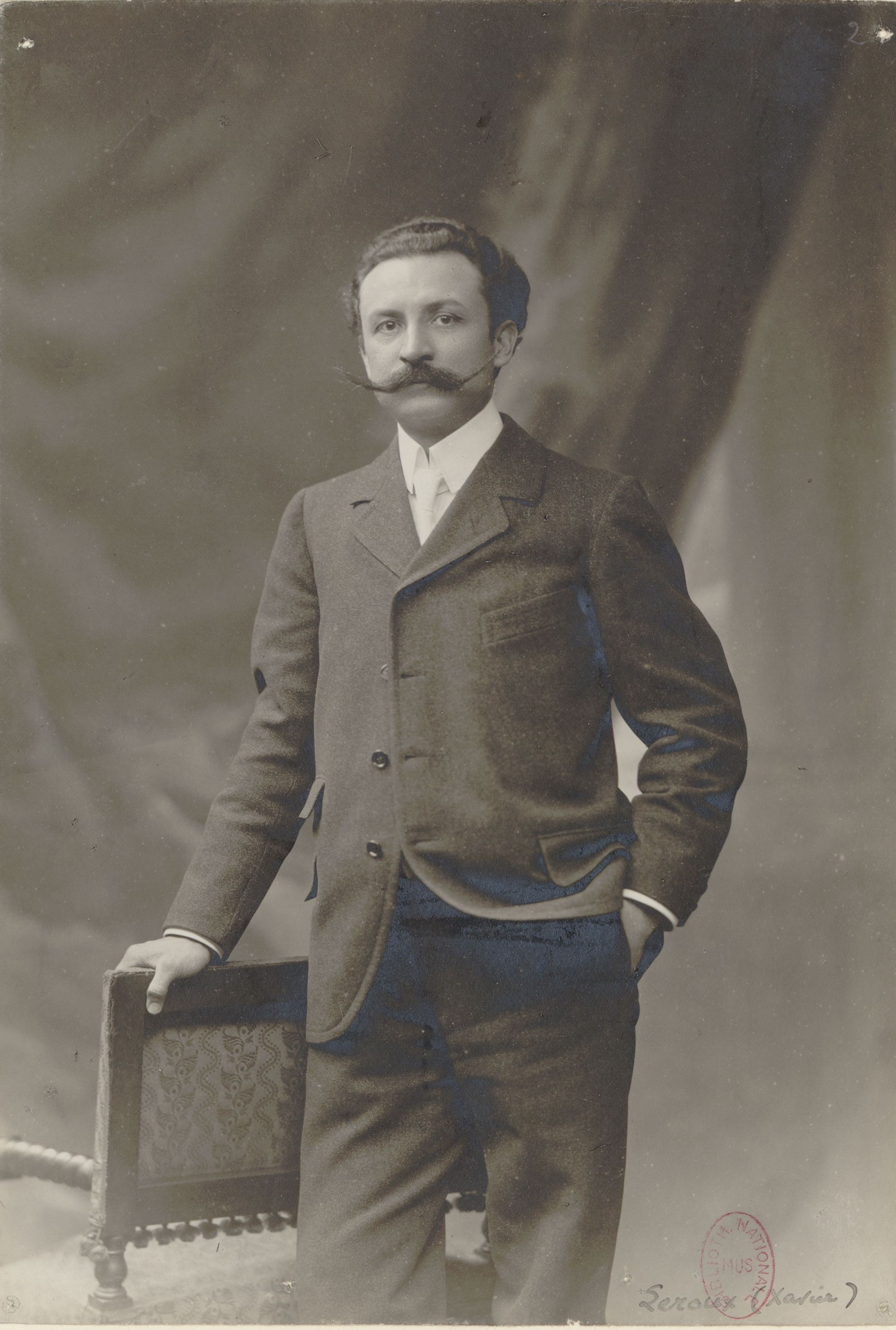 photographie de Xavier Leroux vers 1900